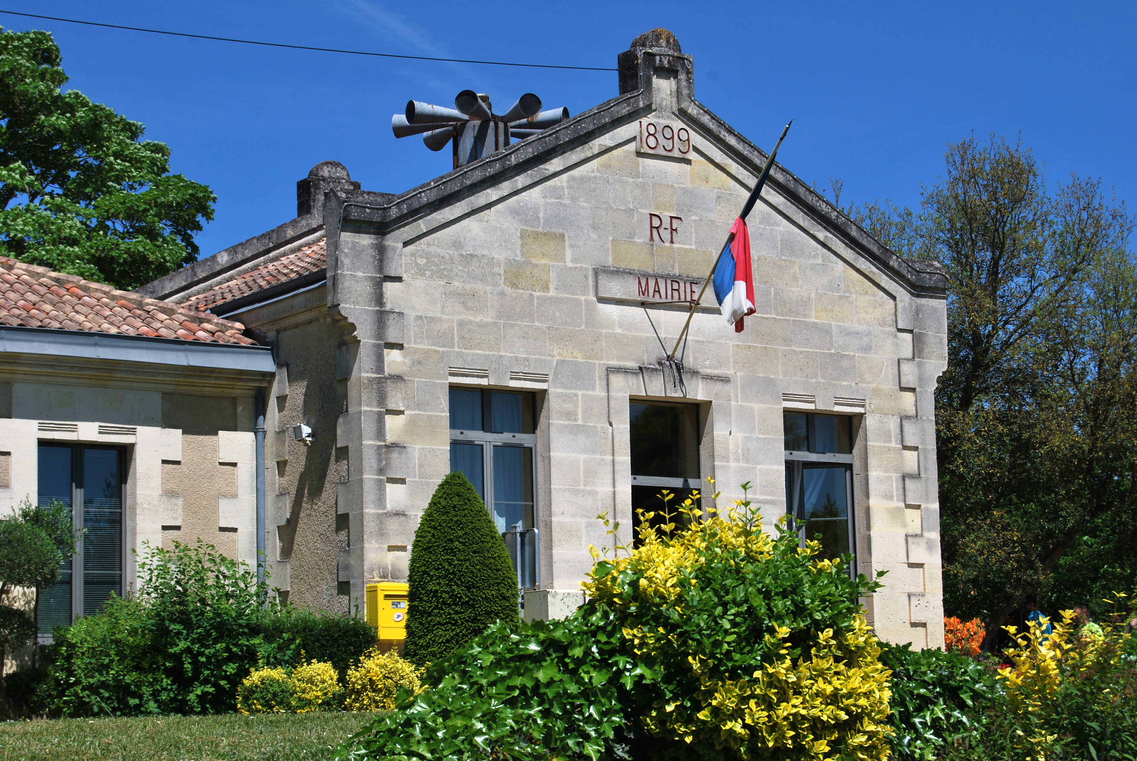 Mairie cursan